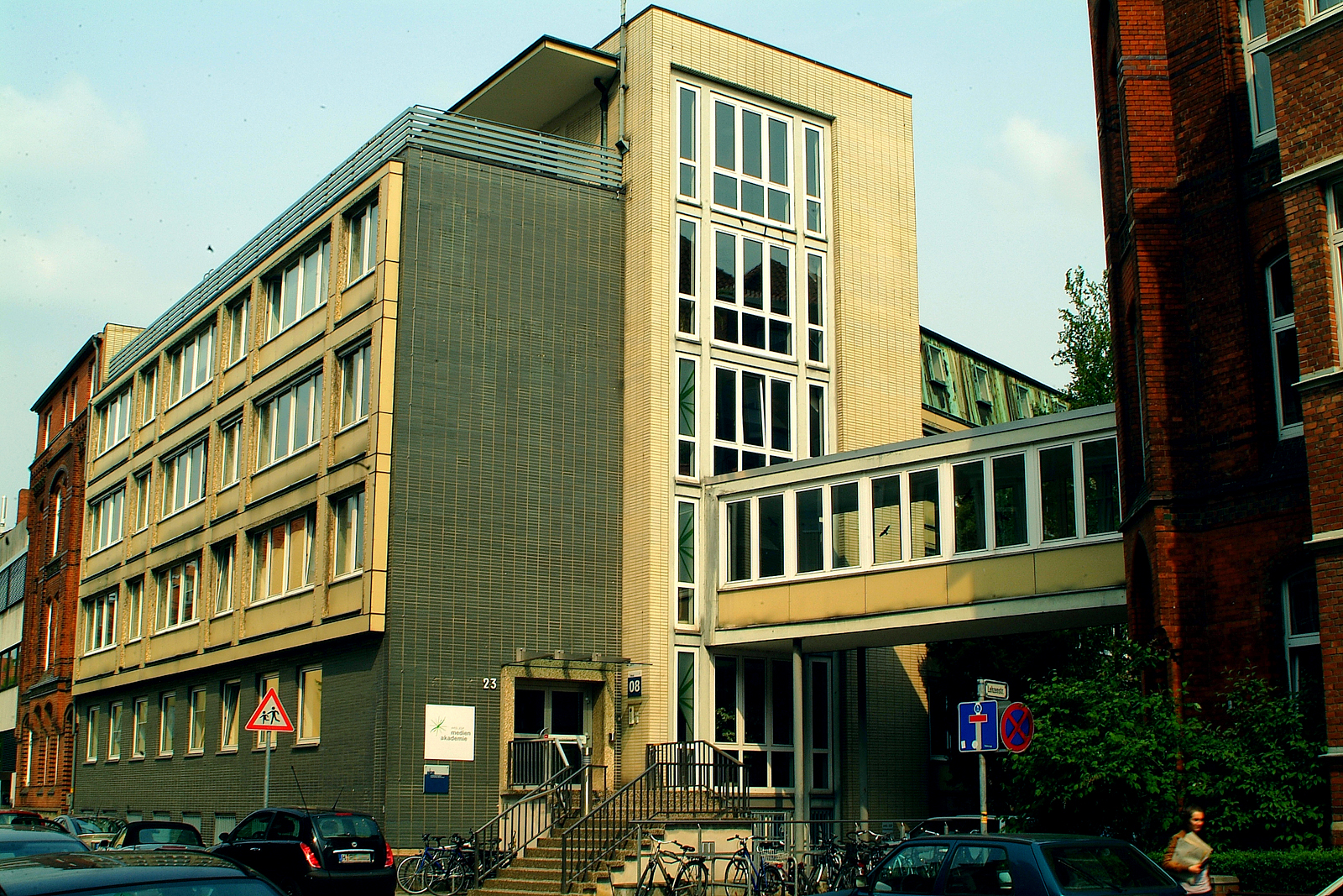 Sie haben ein besseres Bild? Sogar ein historisches Dokument als Bild(ungsförderung)? Zeigen Sie' s uns. Stiften Sie es Ihren Kindern, unseren Enkeln, allen Menschen. Hier.